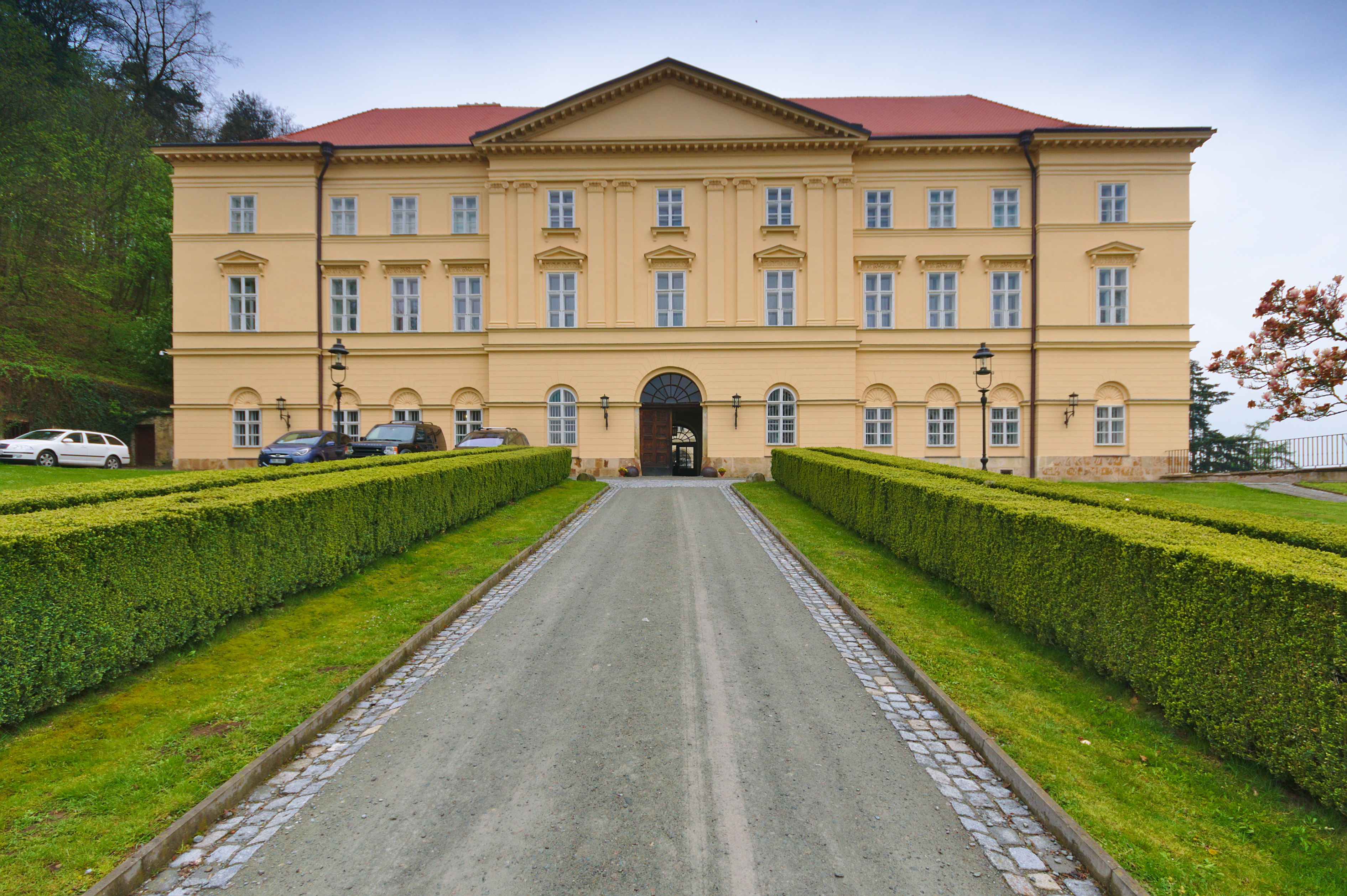 Zámek, Boskovice, okres Blansko